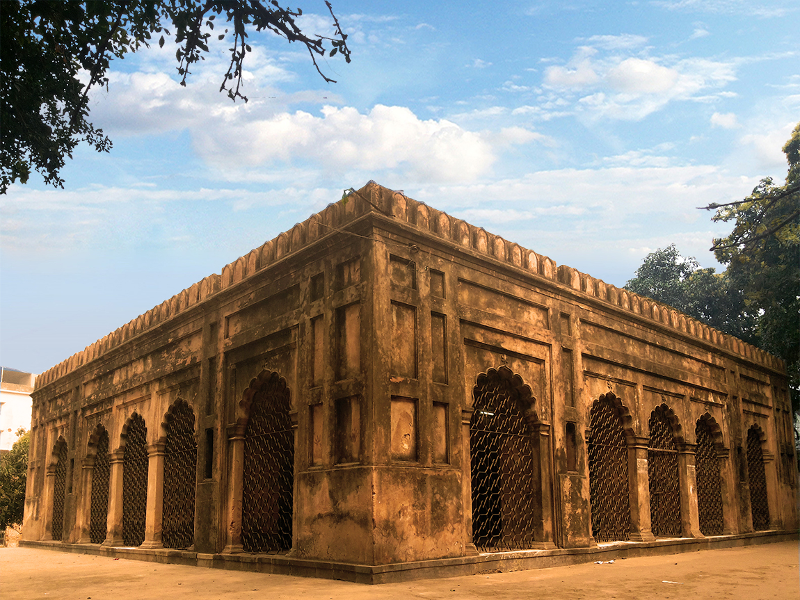 বিবি মরিয়মের সমাধি উত্তর দিক থেকে